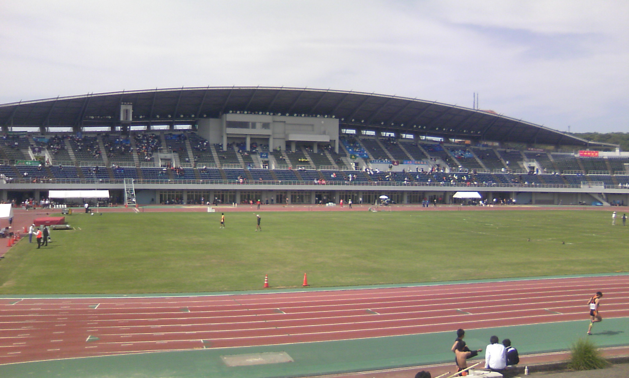 メインスタンド